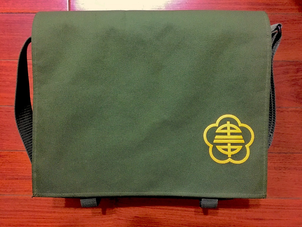 國立臺中第二高級中學側背書包